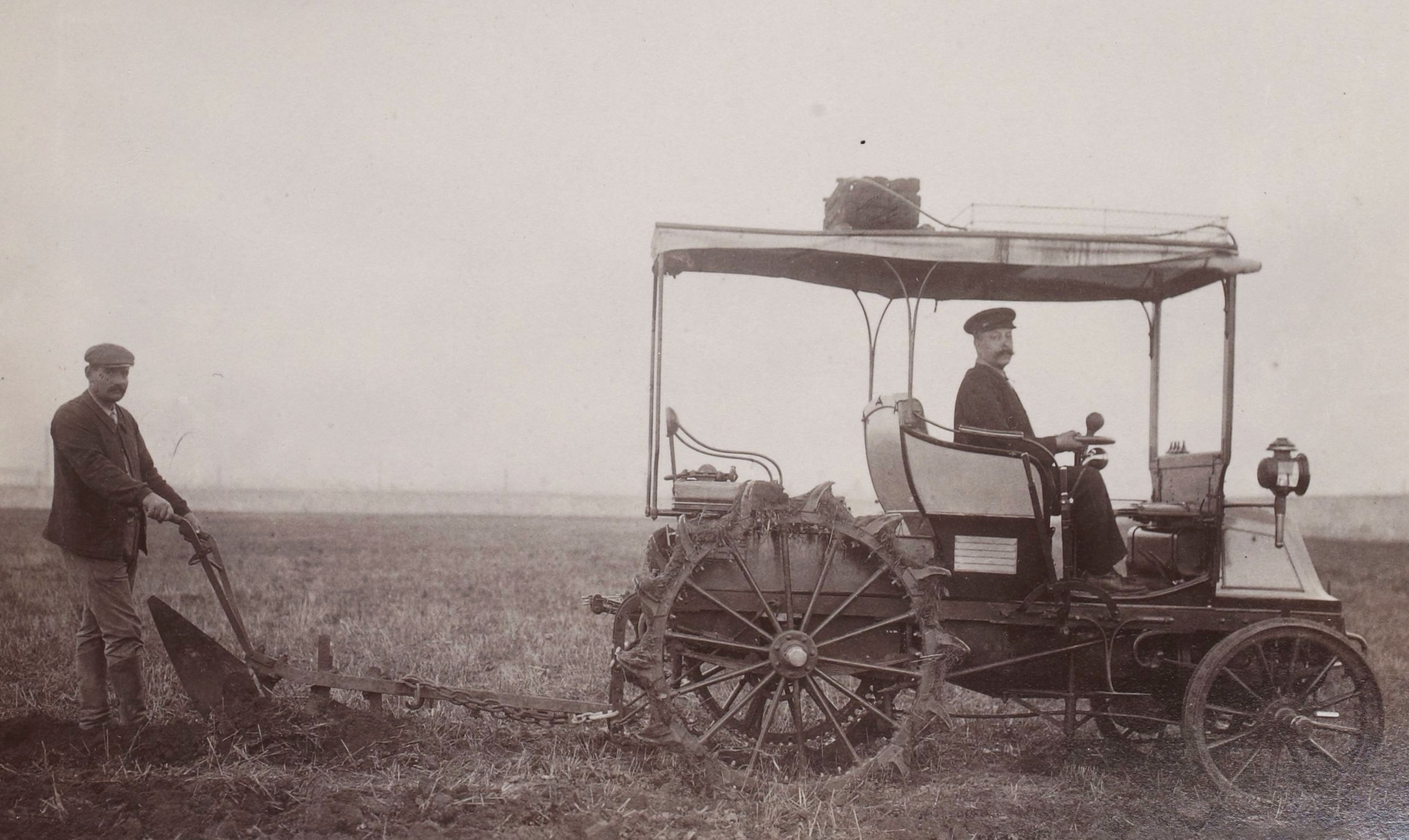 [Collection Jules Beau. Photographie sportive] : T. 14. Année 1901 / Jules Beau : F. 46v. Charrue automobile